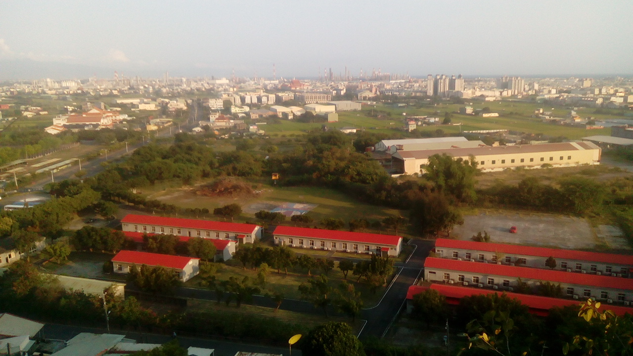 同上